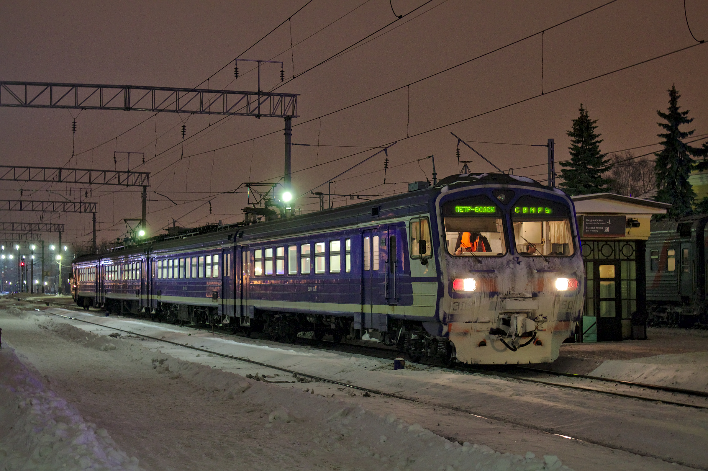 ЭД9М-0150, станция Петрозаводск. см. фото 637889 в альбоме автора